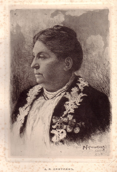 Ганна Дмитрян: І. Горюшкін, 1905 рік, Санкт-Петербург.